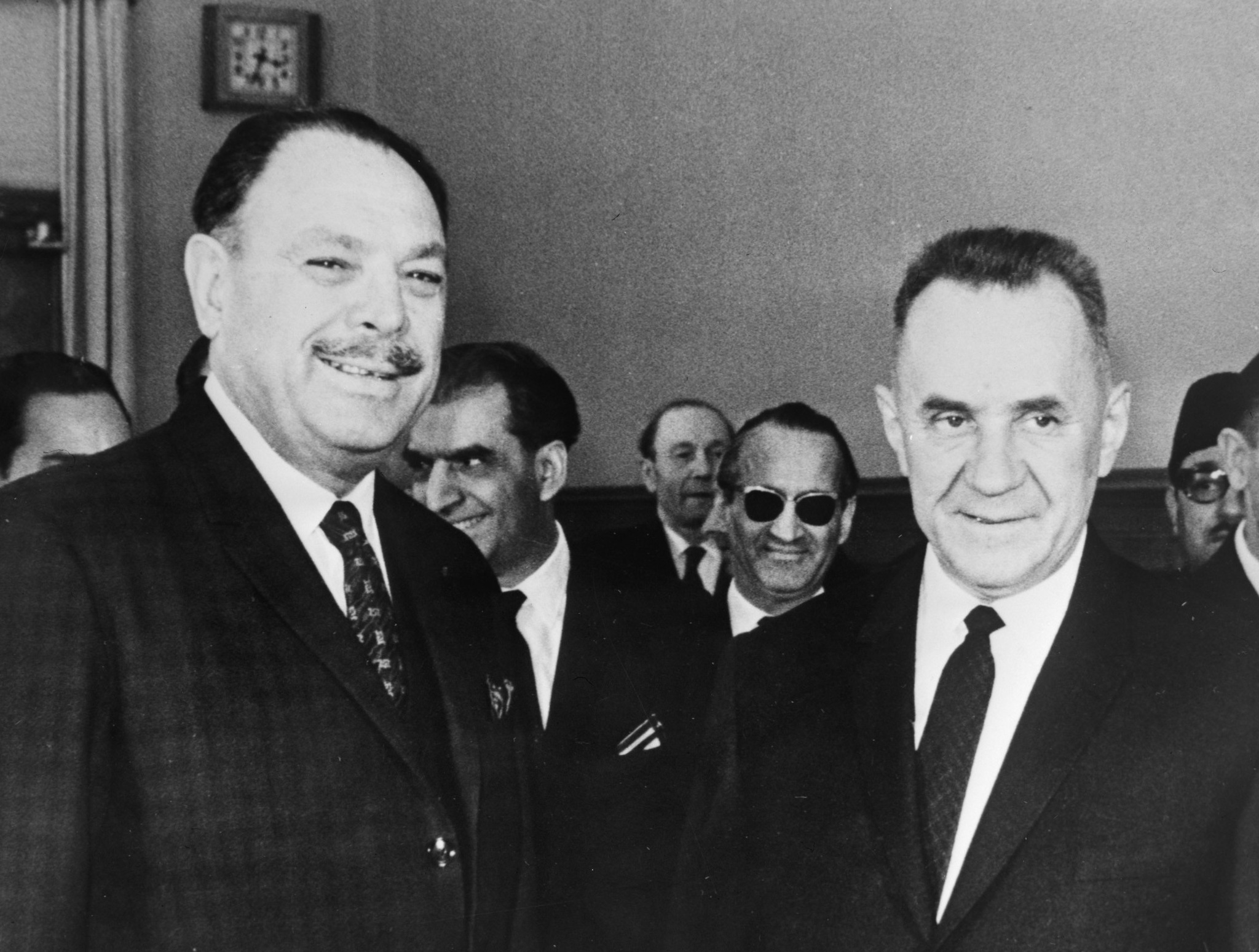 Muhammed Ayub Khan and Alexei Kosygin